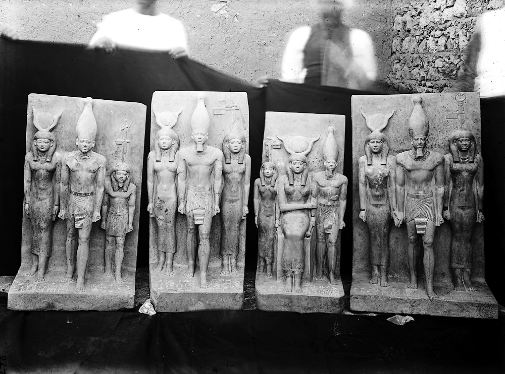 Les quatre triades de Mykérinos lors de leur découverte à Gizeh en 1908. Photographie de George Andrew Reisner. Harvard University-Boston Museum of Fine Arts Expedition inv:HUMFA A278 NS